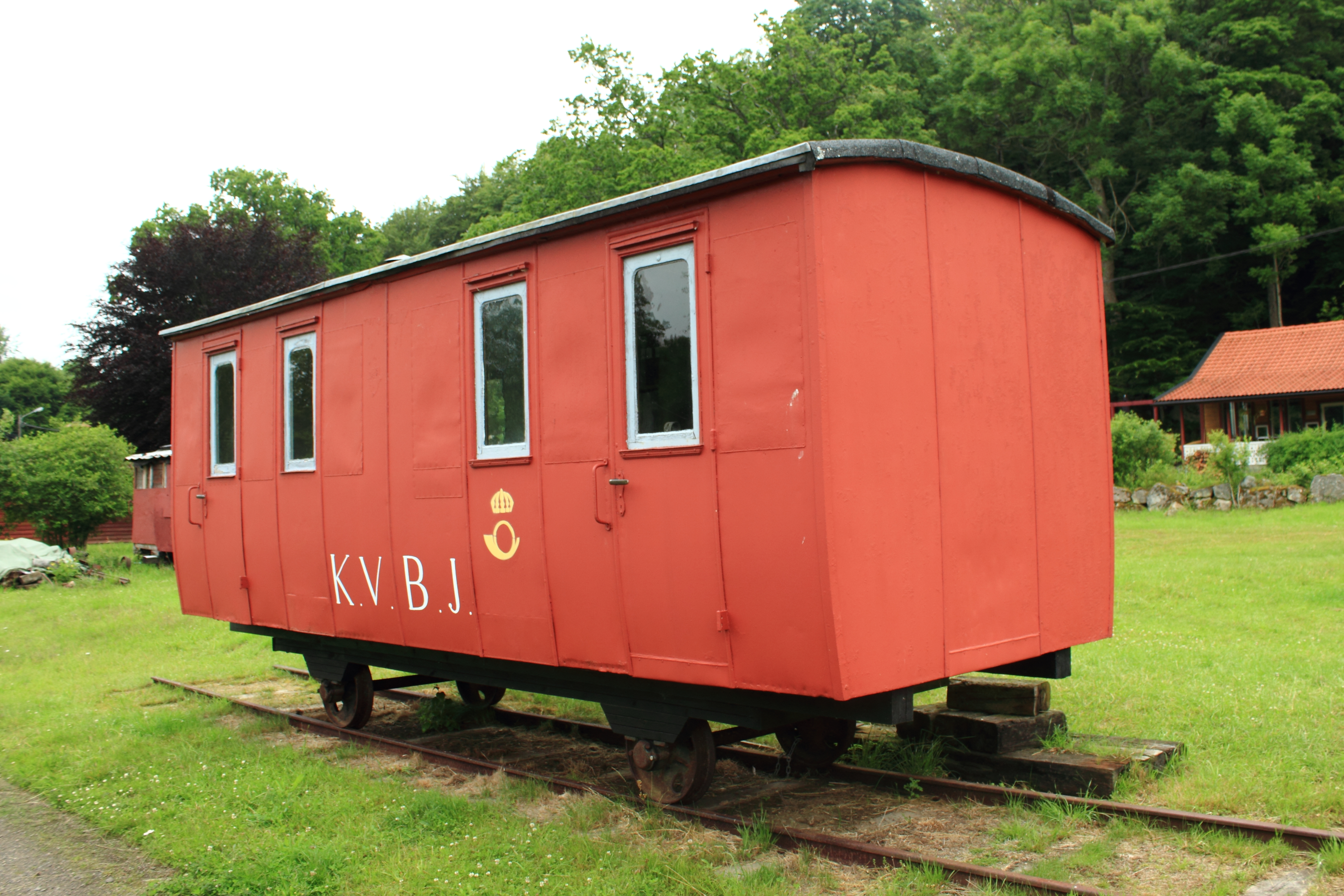 Postvagn från Karlshamn-Vislanda-Bolmens Järnväg vid Hovmansbygds före detta järnvägsstation